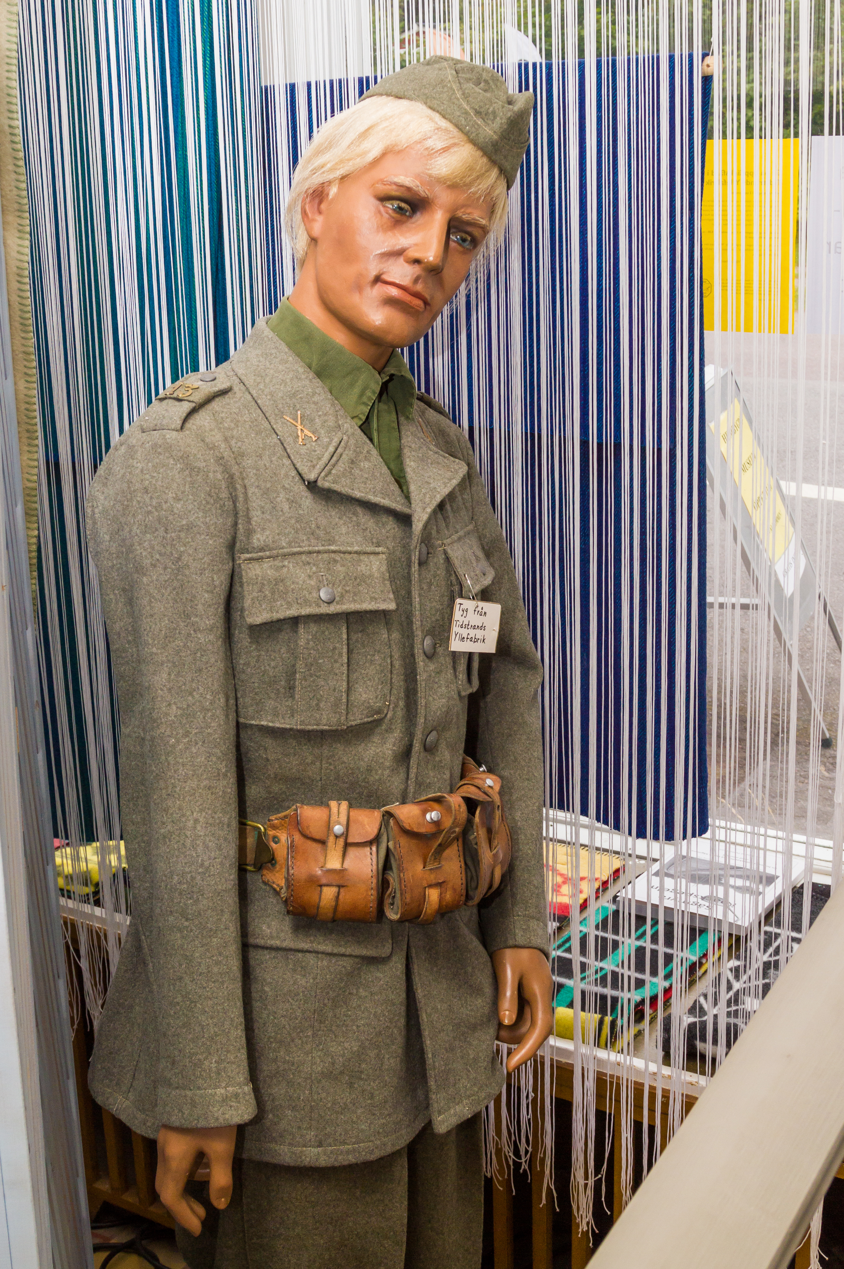 Svenska arméns uniform m/1939 i komisstyg från Tidstrands yllefabriker. Sågmyra Hembygdsmuseum med Tidstrandsutställning. Sågmyra, Falu kommun, Dalarnas län, Sverige.